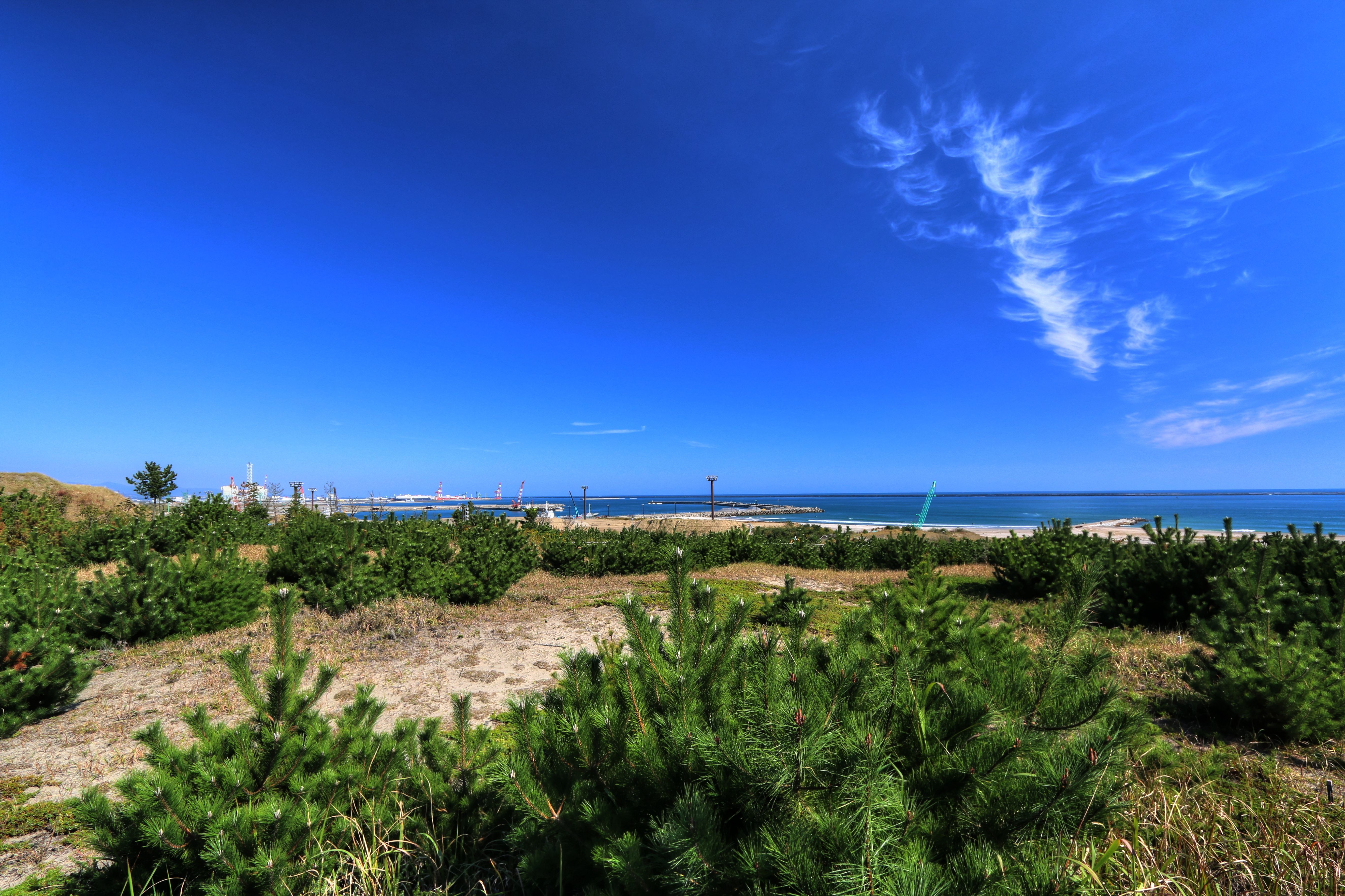 ひたち海浜公園